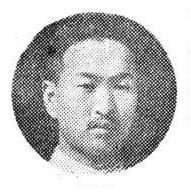 한국의 독립운동가 겸 정치인 설산 장덕수